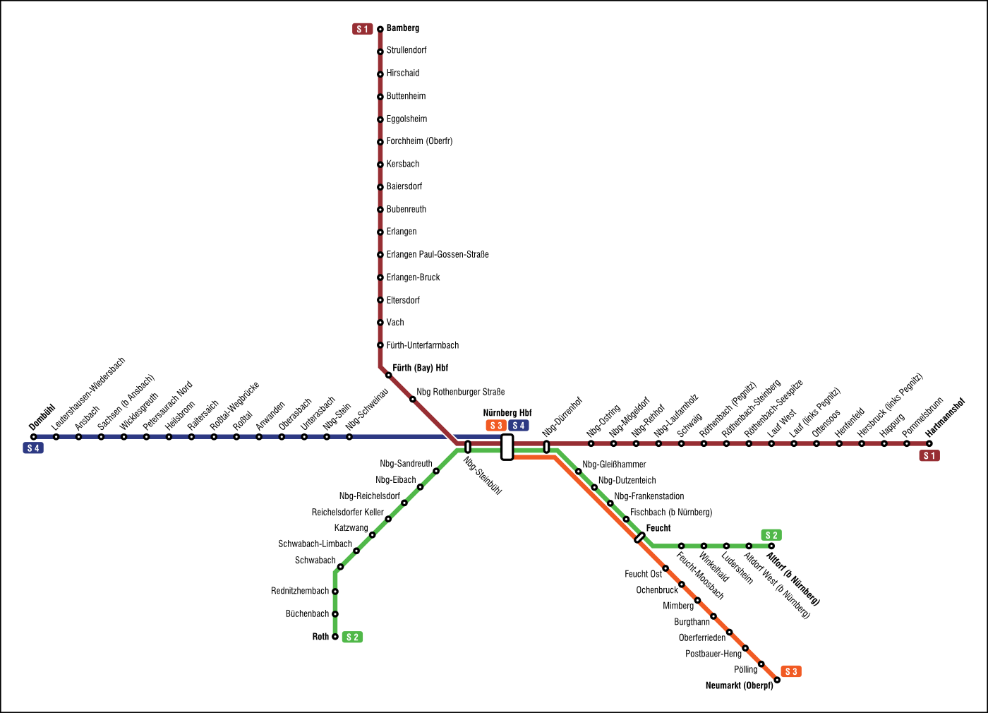 Liniennetz der S-Bahn Nürnberg.